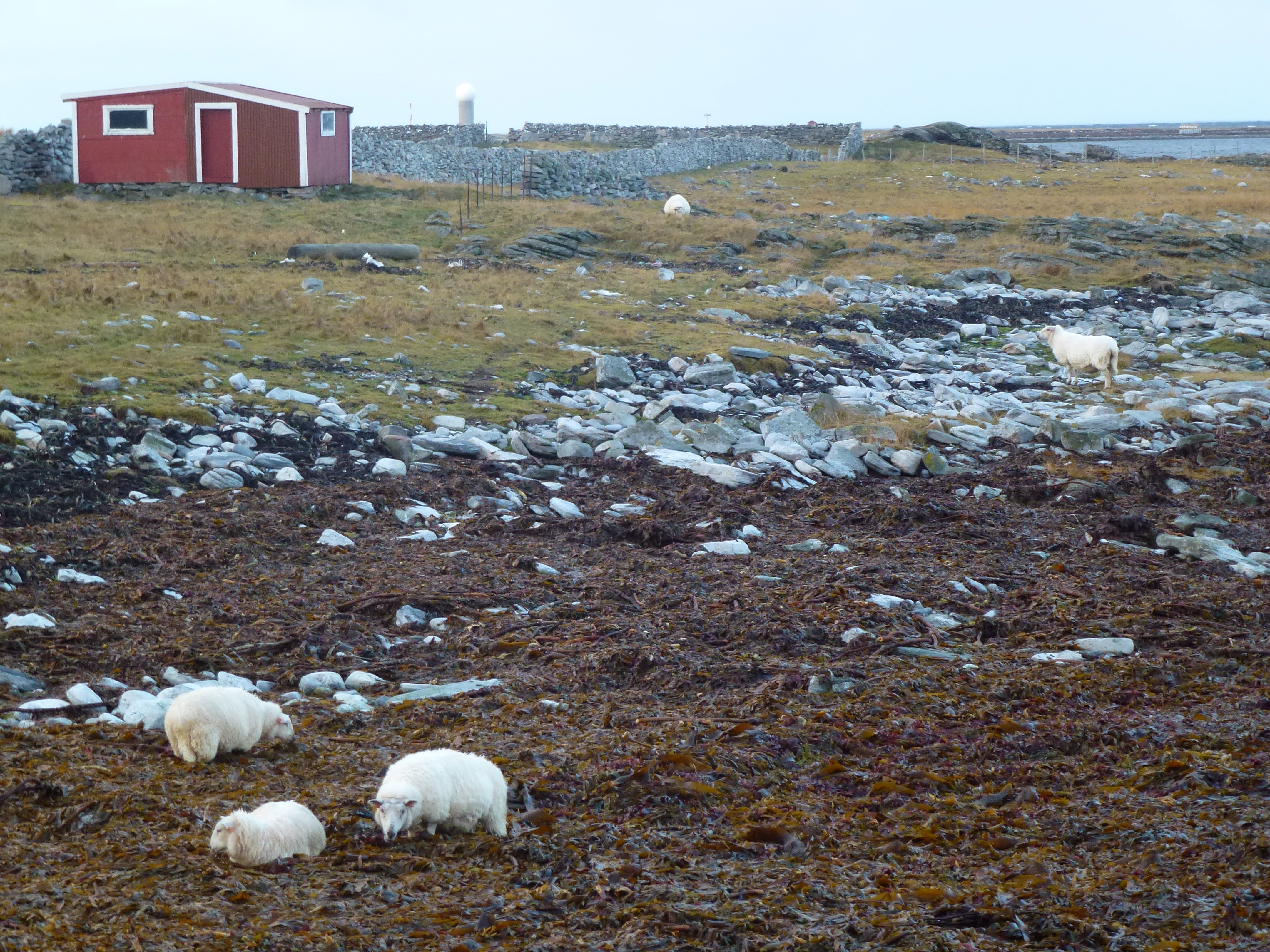 lofotlam røst spiser tang